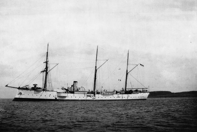 S.M.S. Falke